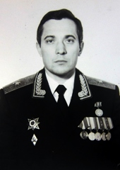 Командир 78-й танковой дивизиии генерал-майор А.В.Квашнин (род. 1946)